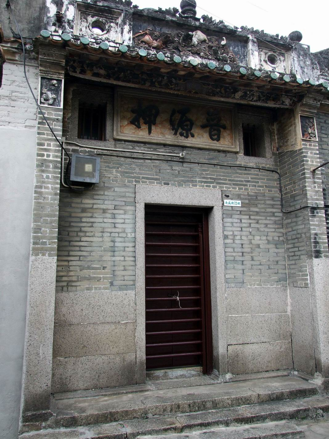 元朗舊墟晉源押